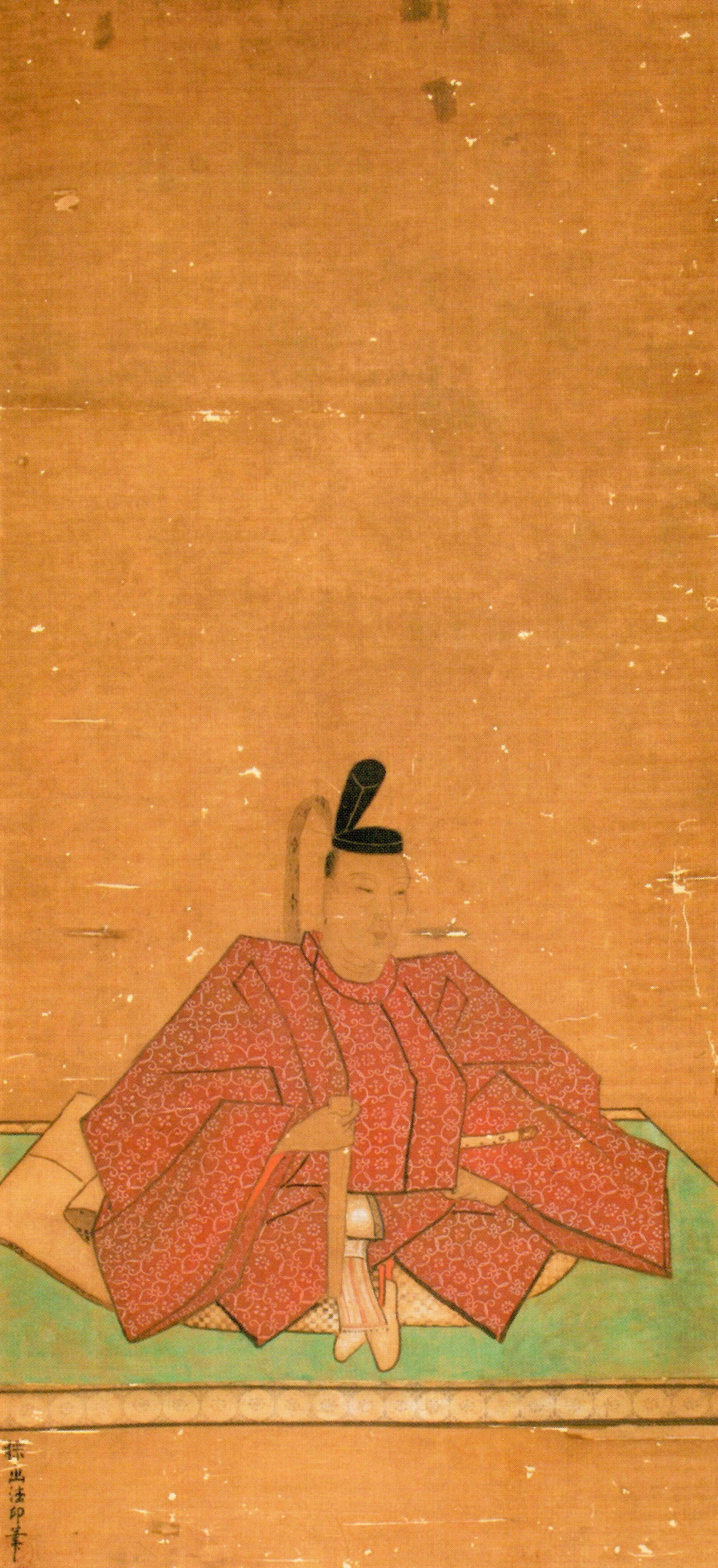 本多政長の肖像。